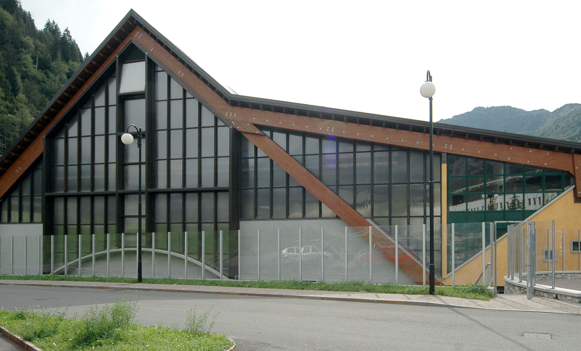 Icehall in Pontebba, Friuli, Italy